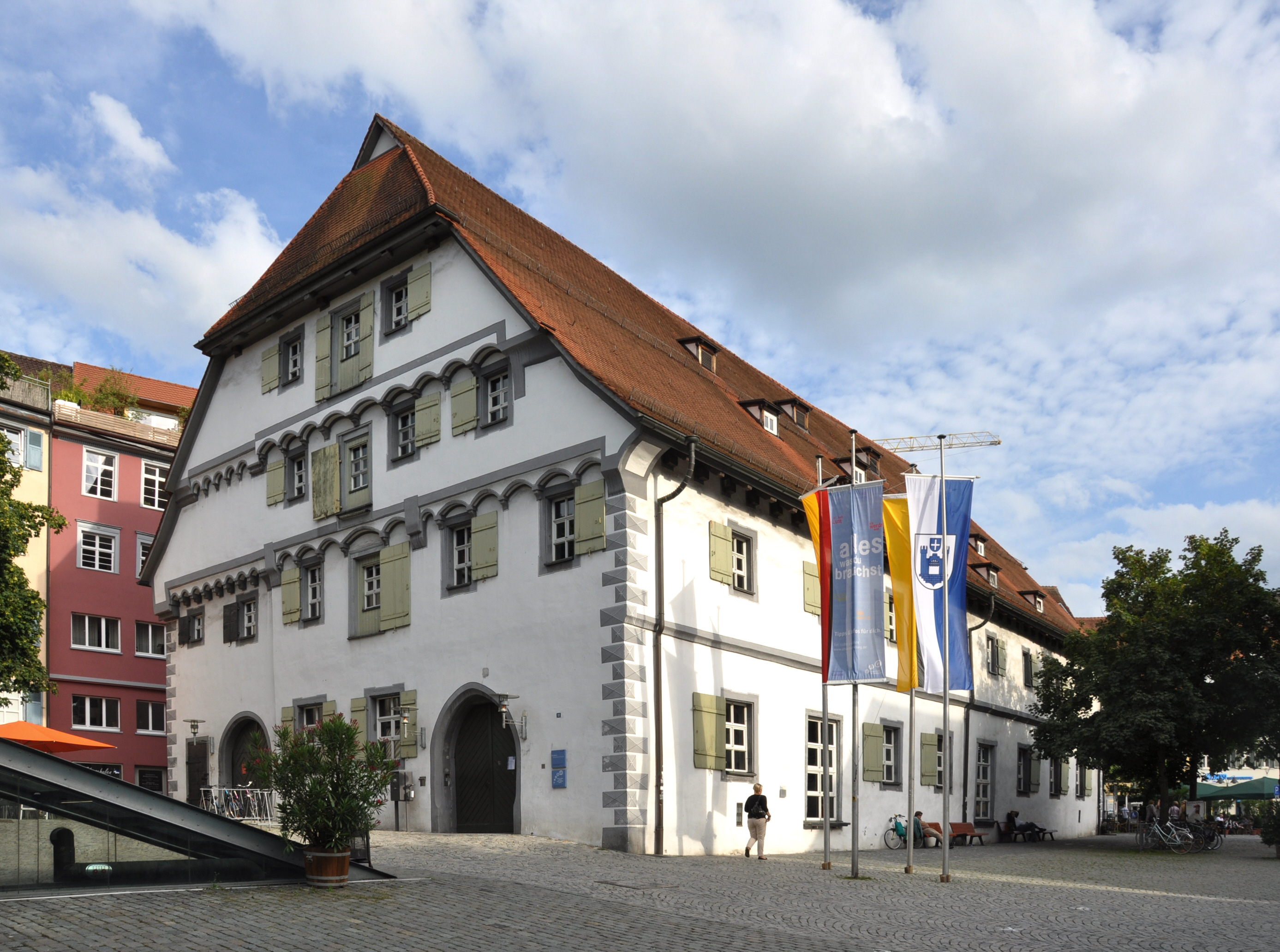 Ravensburg, Kornhaus (Stadtbücherei)